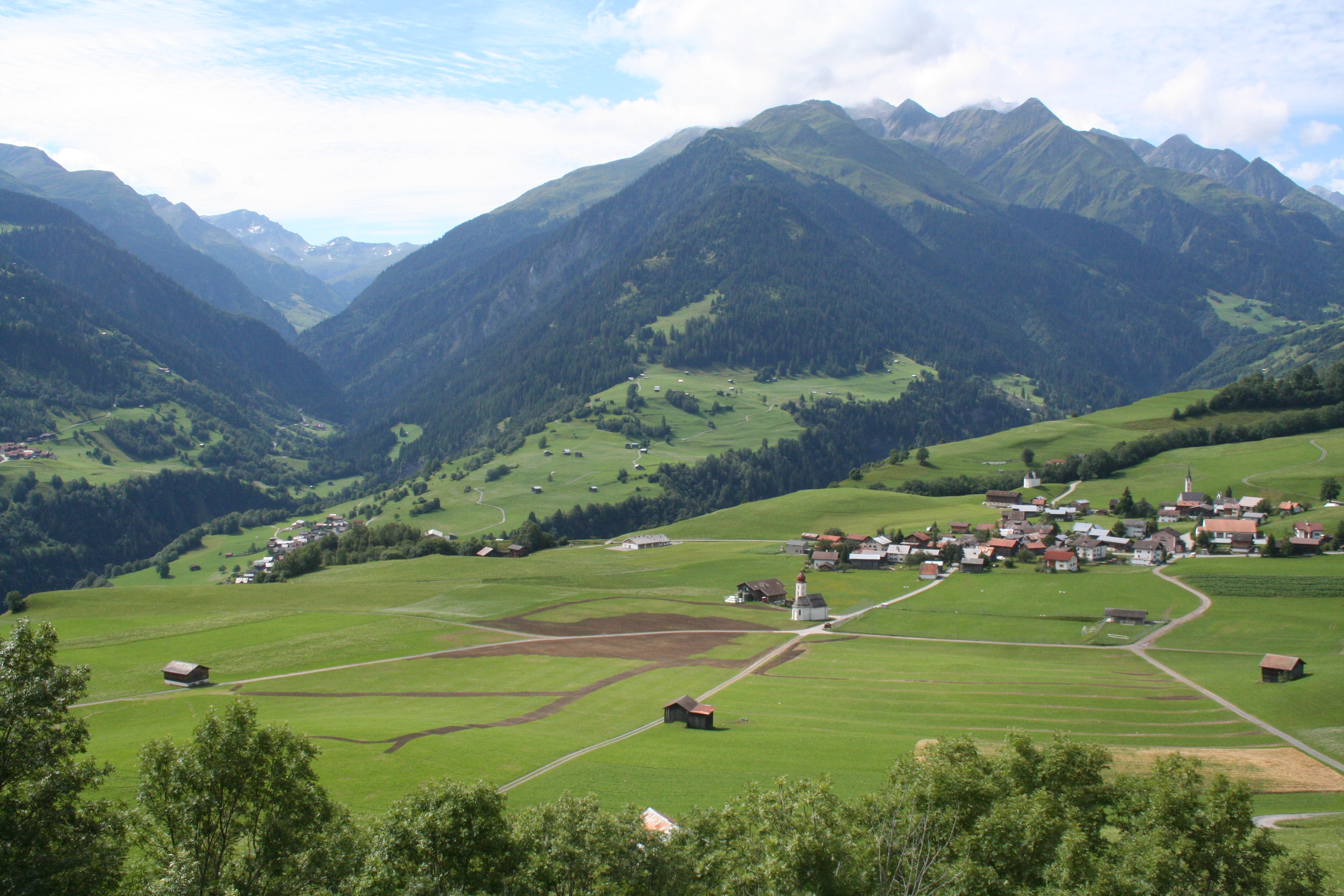 Degen GR Blick nach SW, Gelände des Open Air. Links das Valser Tal.